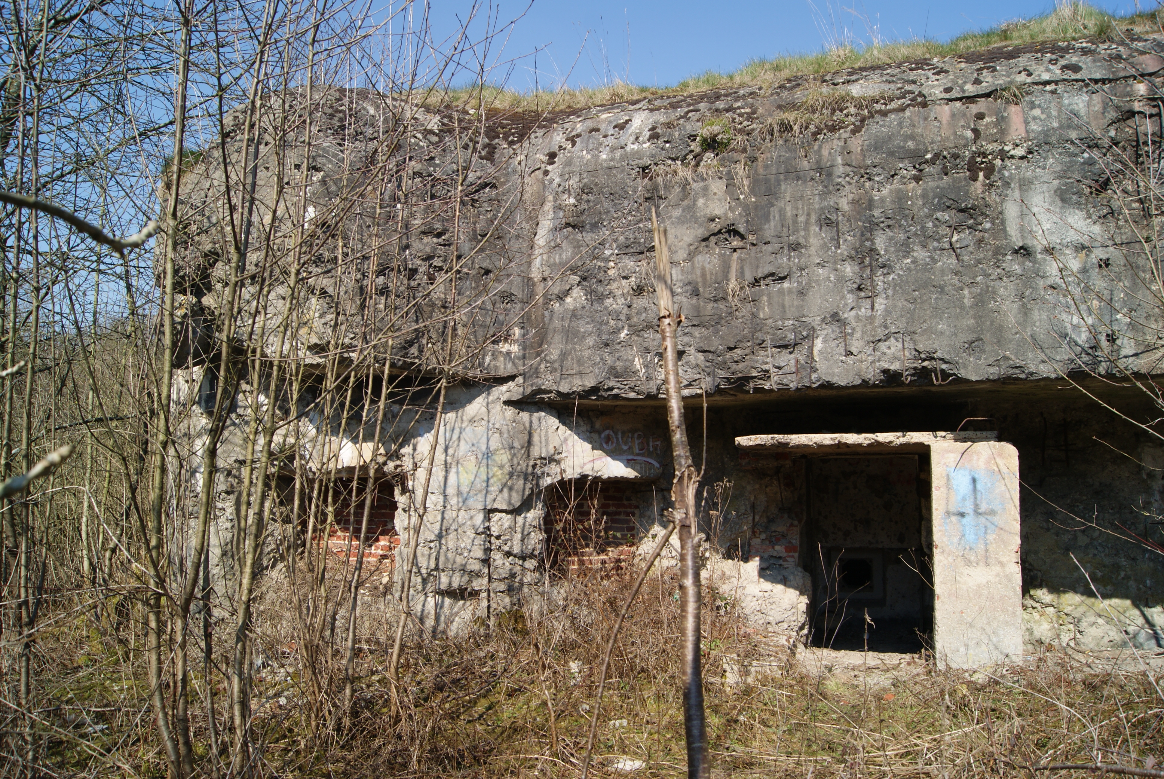 Bloc 1 de l'ouvrage de Boussois, vue depuis le Sud